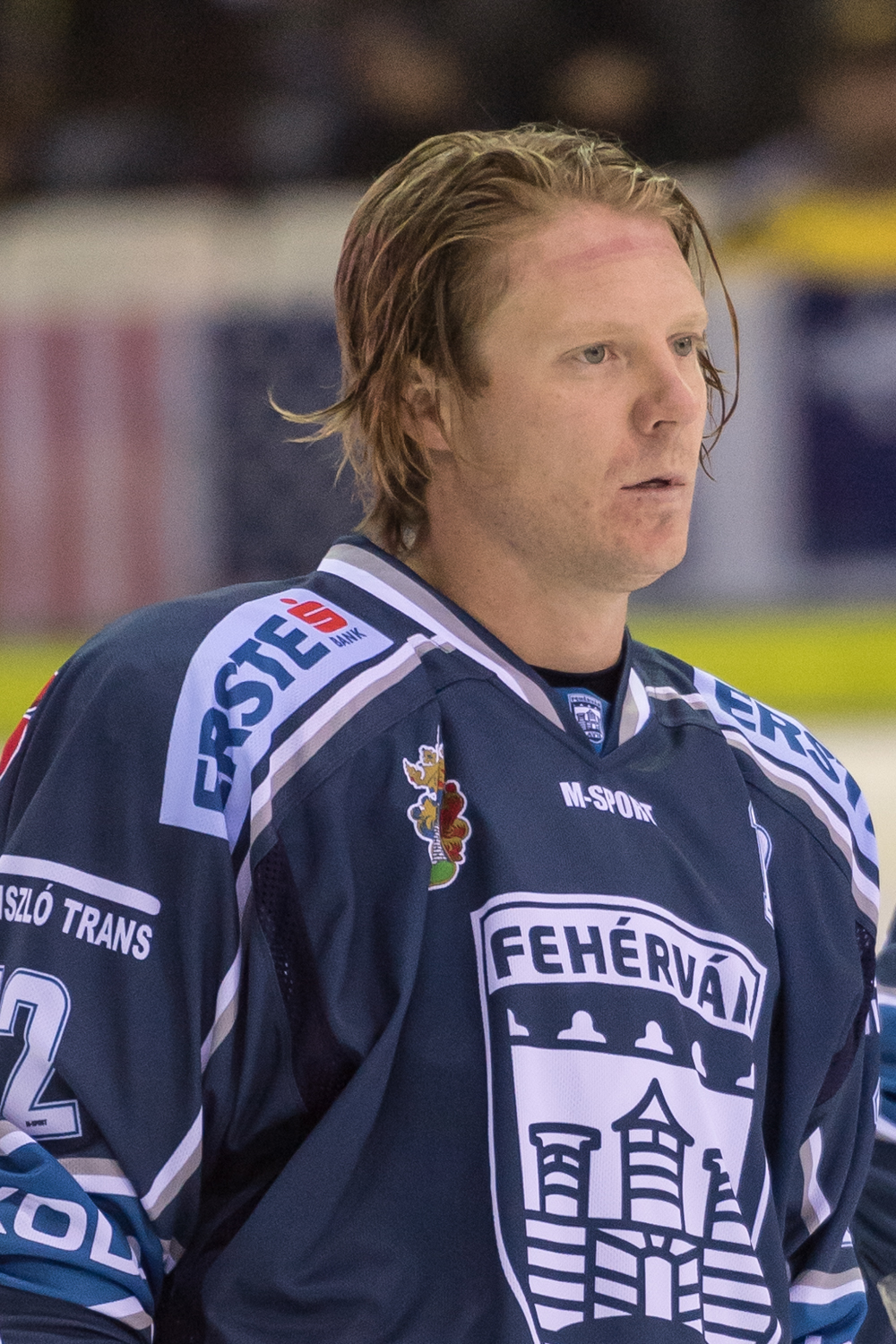 Erste Bank Eishockey Liga - UPC Vienna Capitals vs SAPA Fehervar AV19 am 14. Oktober 2016. Bild zeigt Adam Courchaine (AVS).